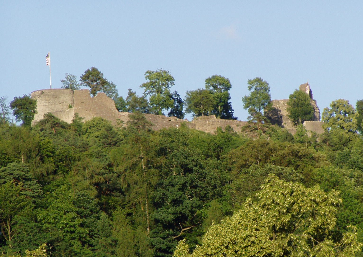 Castle Botenlauben in Bad Kissingen